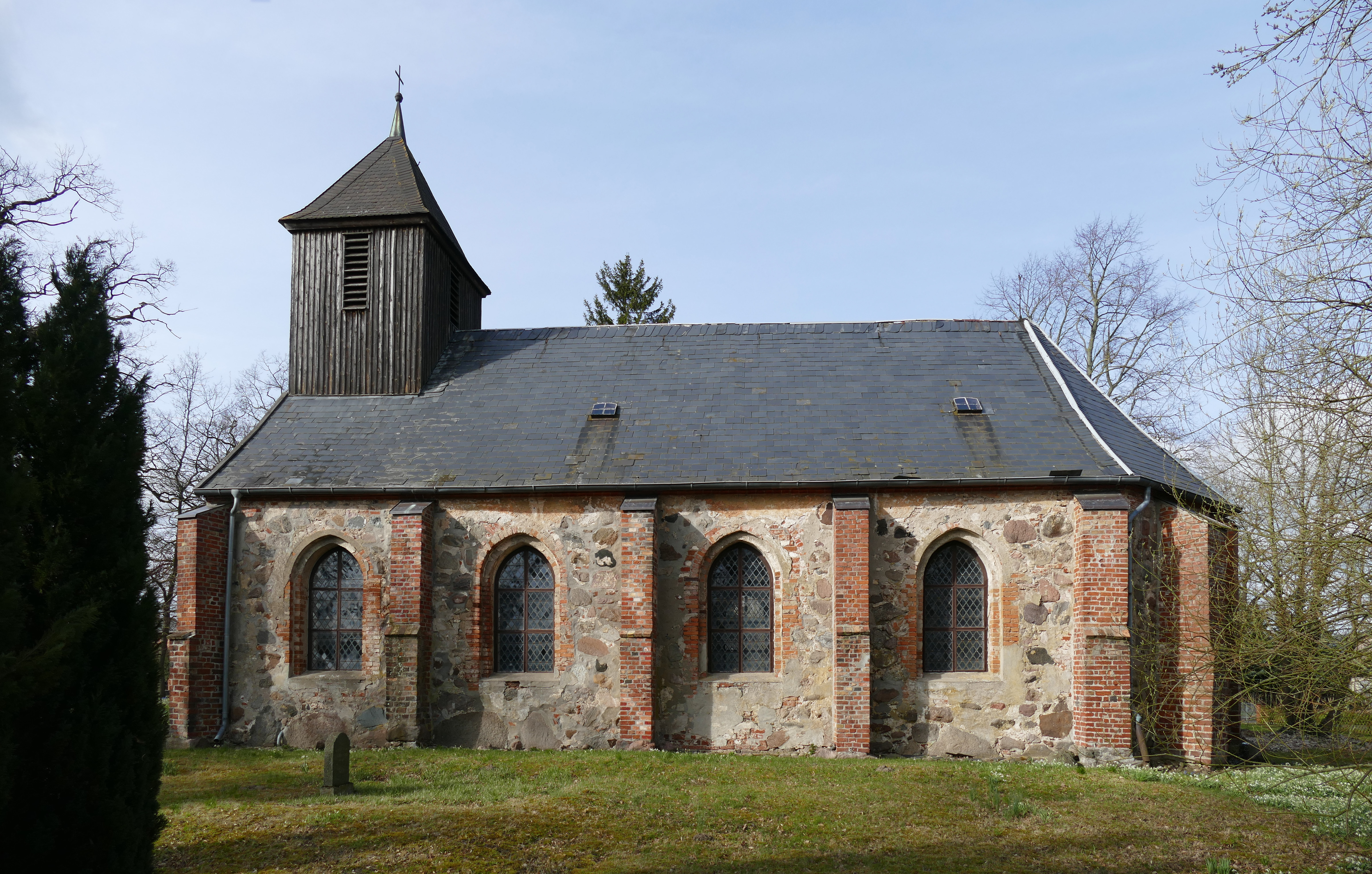 Kirche Hohenbollentin, Ansicht von Süden